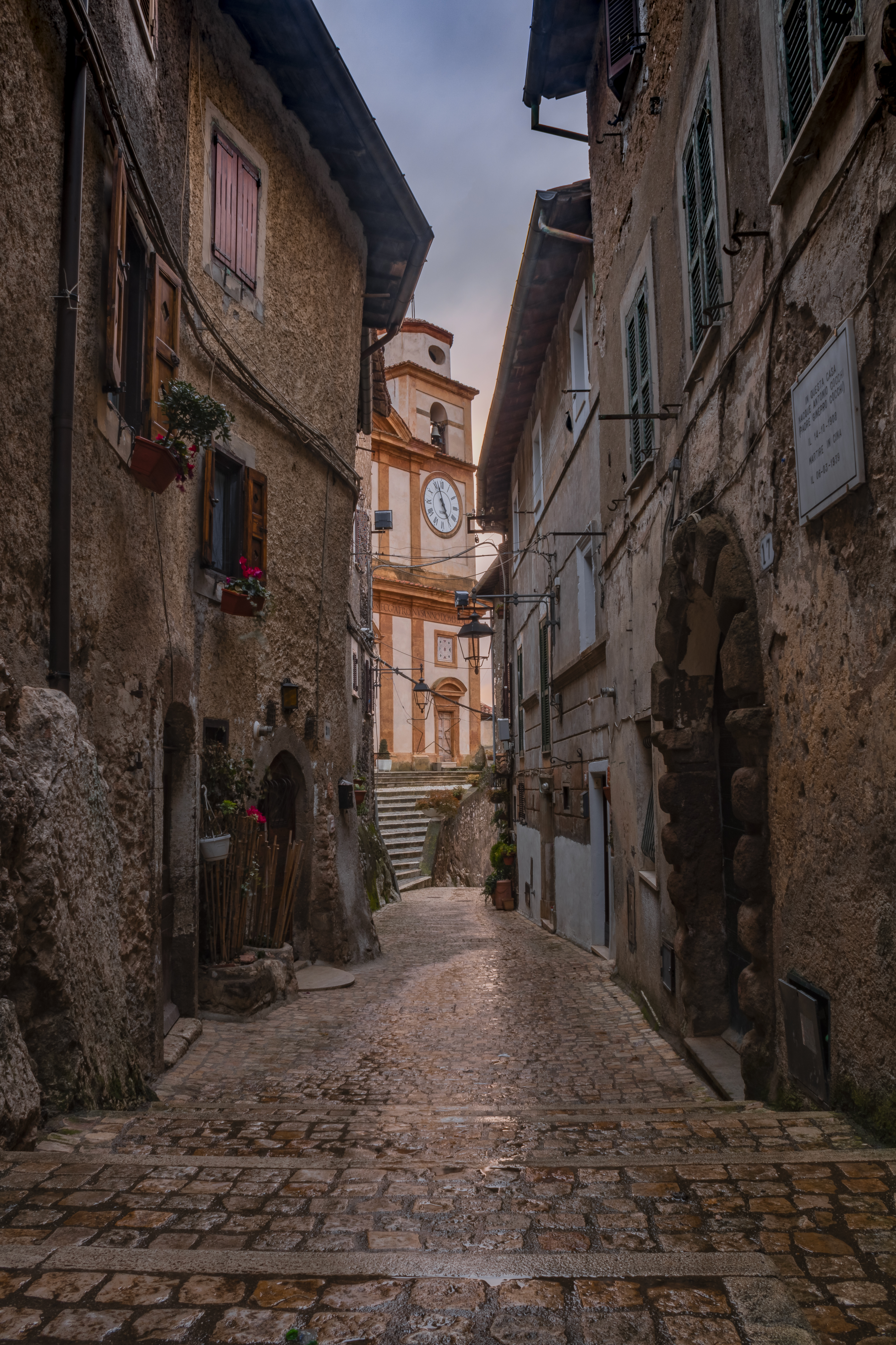 Collegiata di Santa Croce. Svetta alta sopra al borgo di Artena. Foto di Christian Evangelista